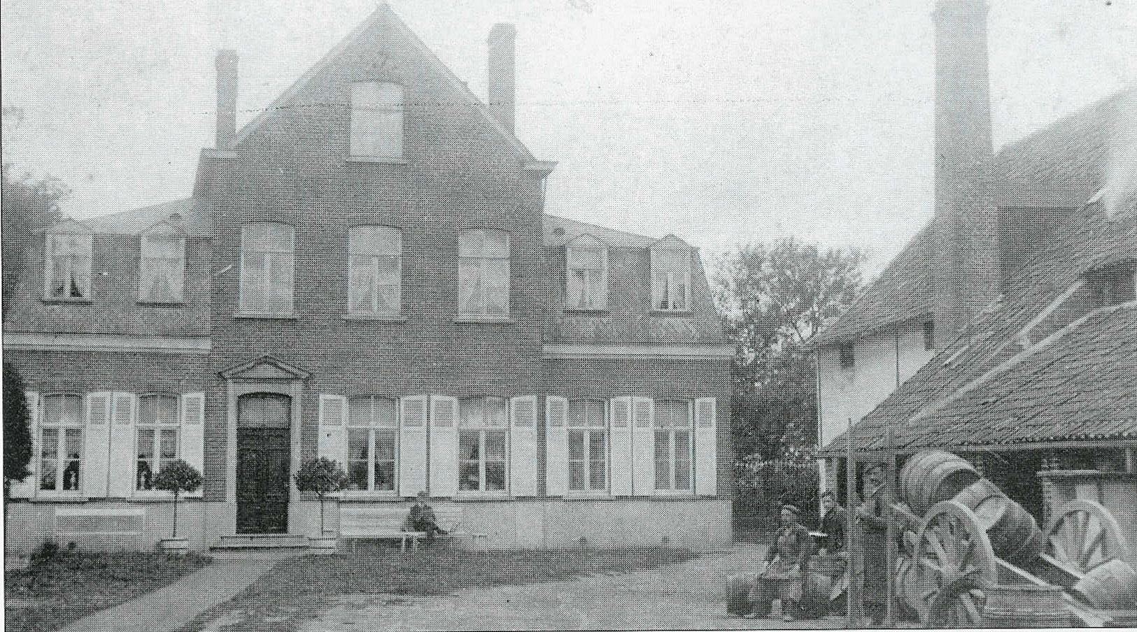 Brouwerij Meiresonne (1871-1918) - nu volledig verdwenen - Landegem - Nevele - Oost-Vlaanderen - België